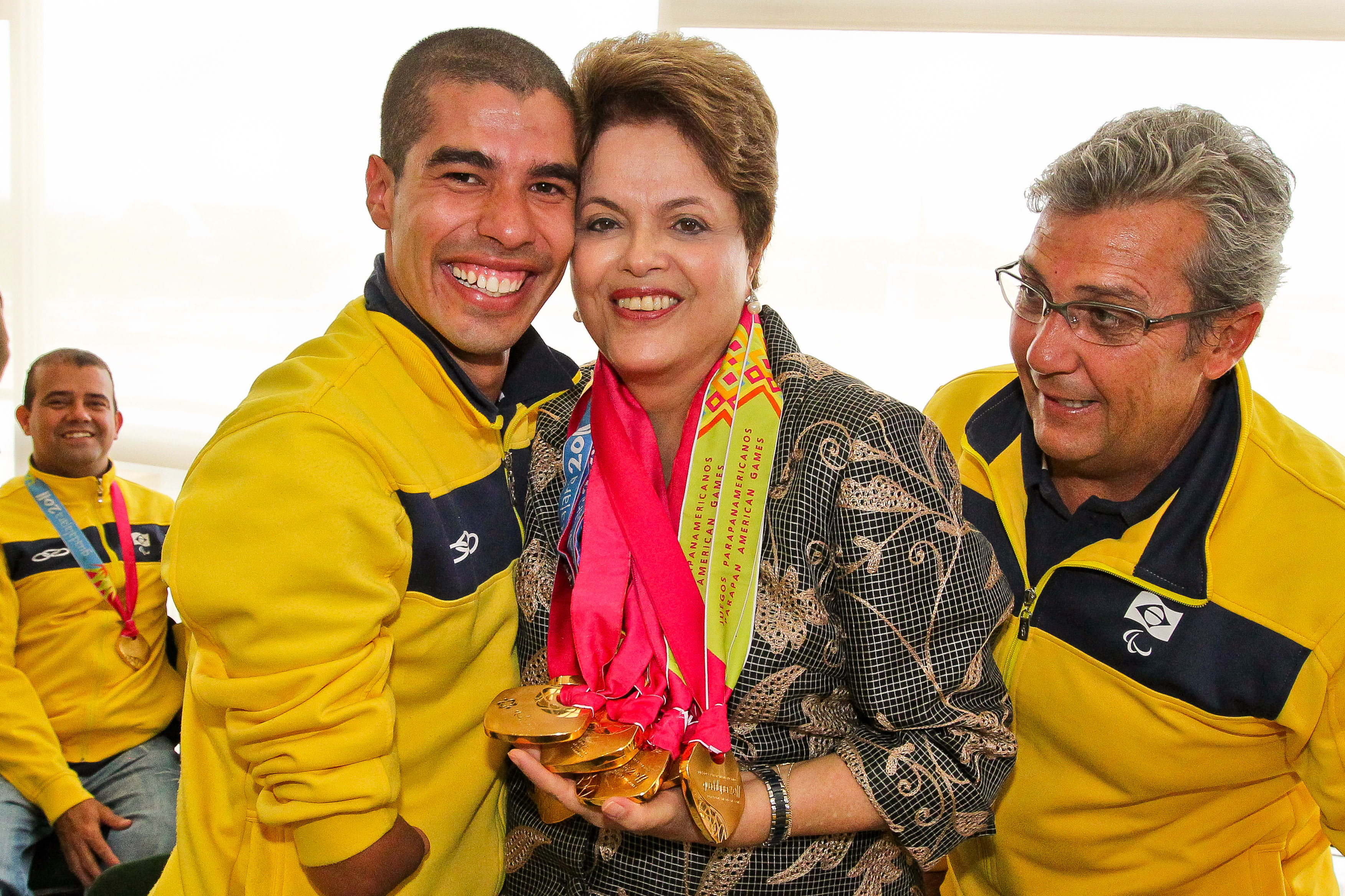 Presidenta Dilma Rousseff com o nadador Daniel Dias, maior medalhista em uma única edição dos Jogos Parapan-Americanos. (Brasília - DF, 24/11/2011)